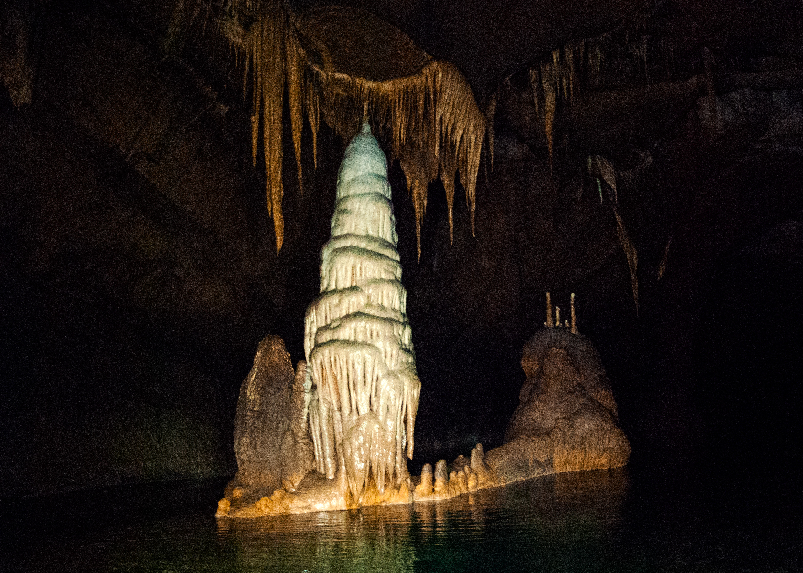 Gusarska ladja, skupina stalagmitov povezanih v celoto, Križna jama, Slovenija.